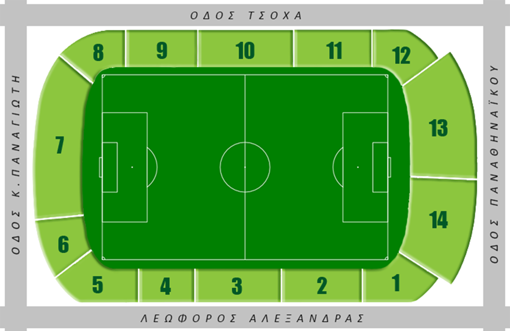 Σχεδιάγραμα του σταδίου Απόστολος Νικολαϊδης στη Λεωφόρο Αλεξάνδρας